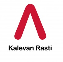 Kalevan Rastis klubblogo